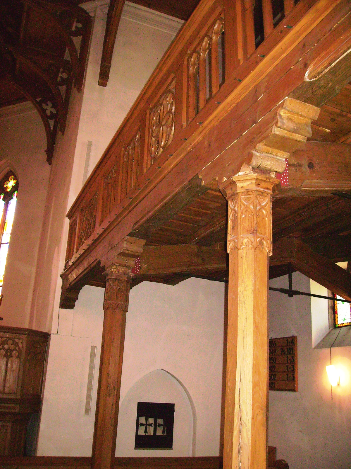 Pfarrkirche St. Johannes (Hechingen), Germany